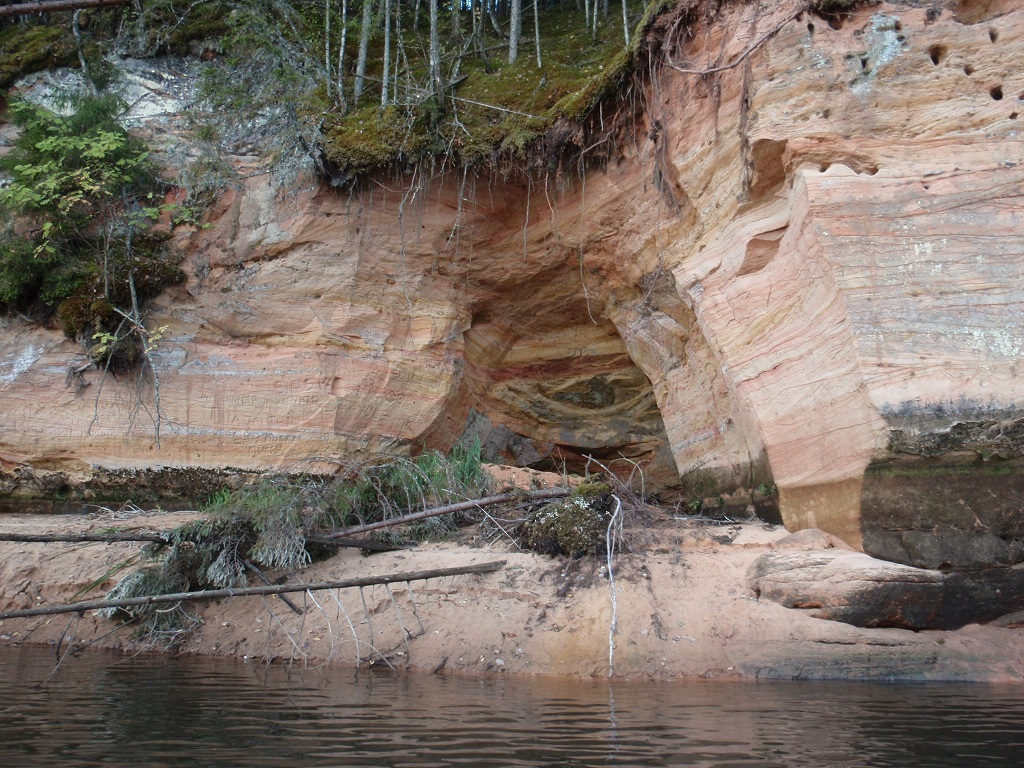 Oosemäe koobas 2015 septembris langetatud veetasemega